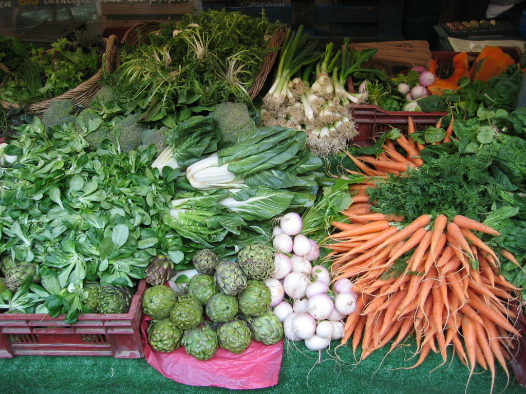 Légumes